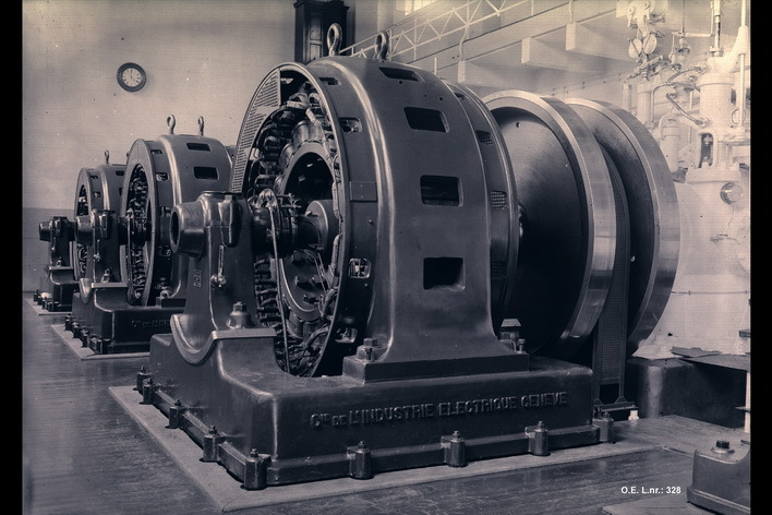 Generatorene i Hammeren kraftstasjon, Oslo, Nordmarka, 1911.